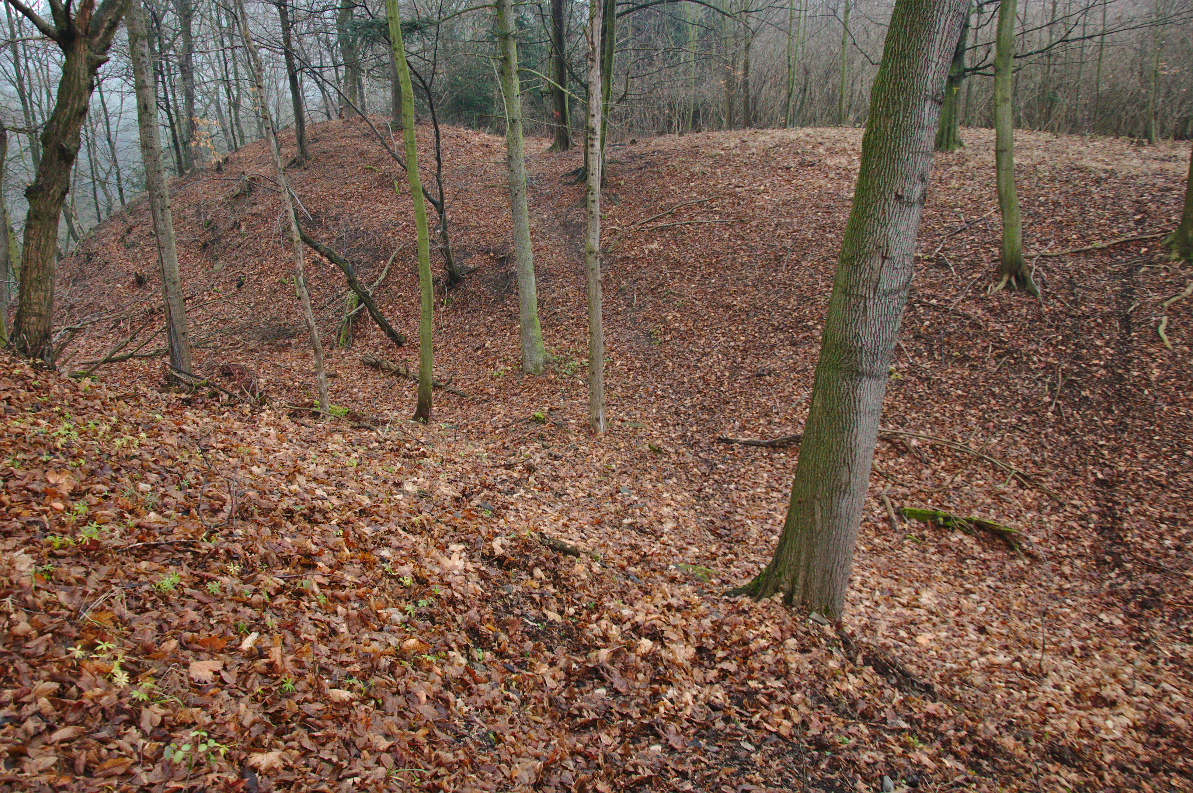 Ježův hrad, Vojenský újezd Březina, okres Vyškov